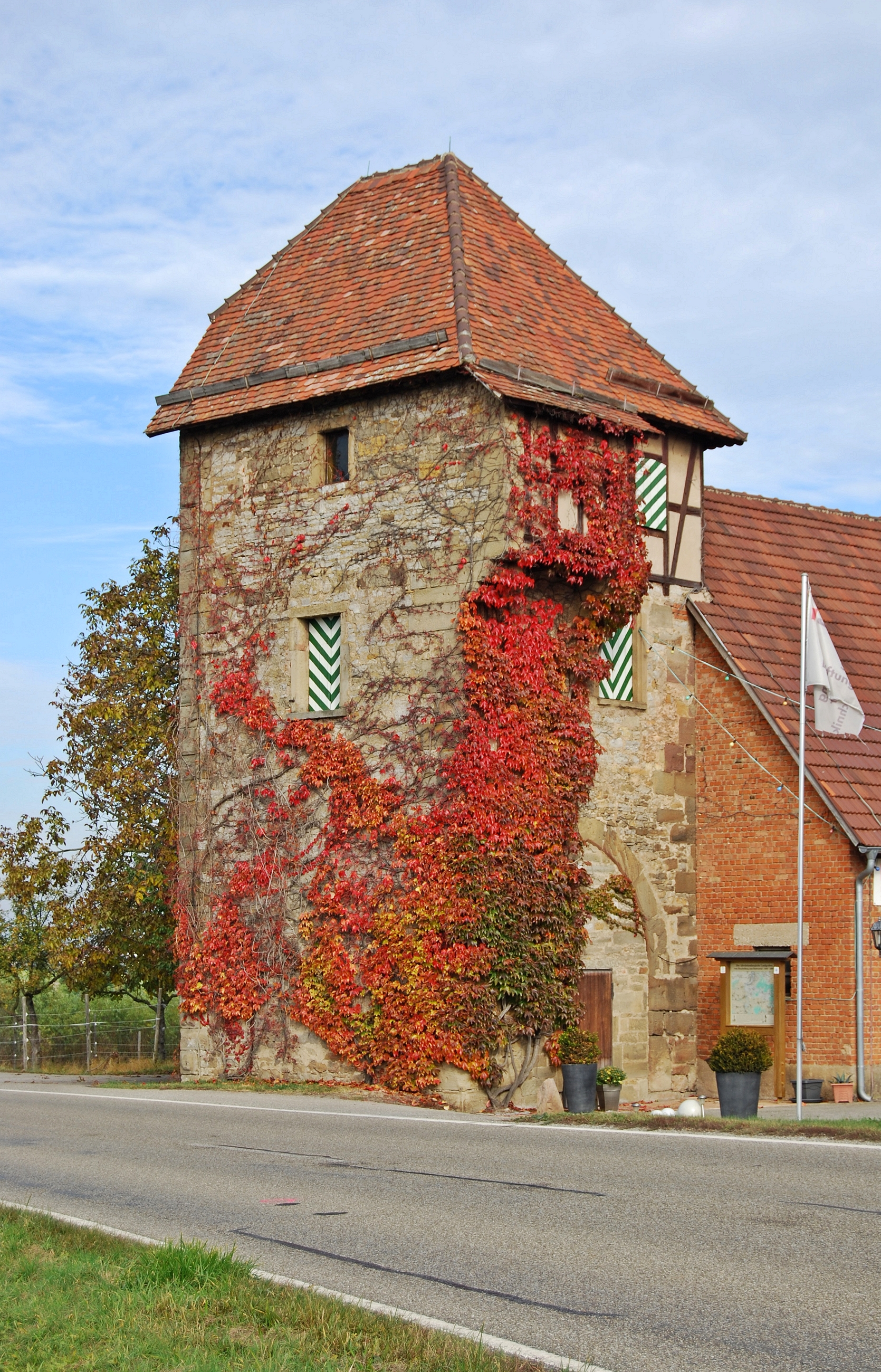 Der Landturm bei Lauffen am Neckar, Baden-Württemberg.